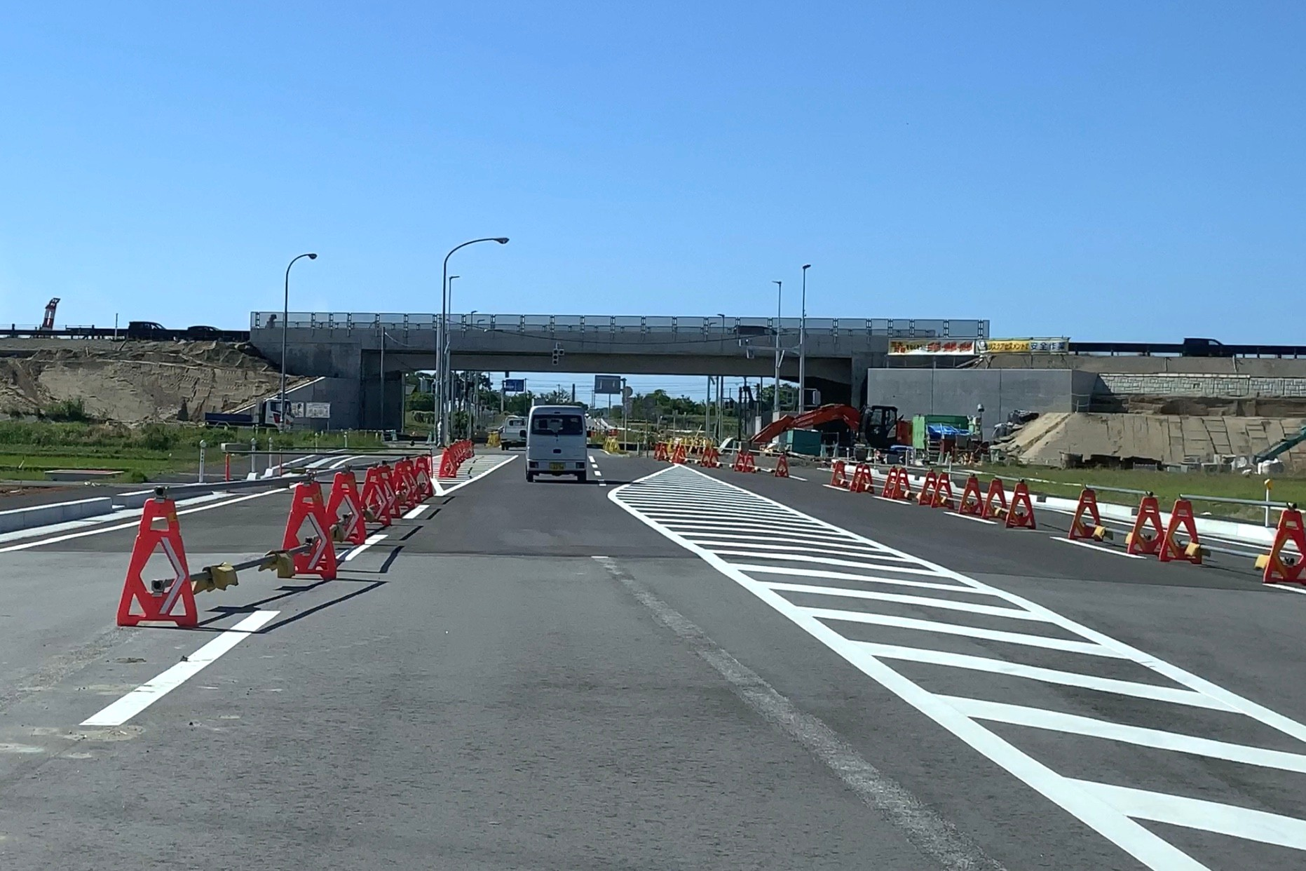 新新バイパス・大夫興野インターチェンジ（2020年5月）